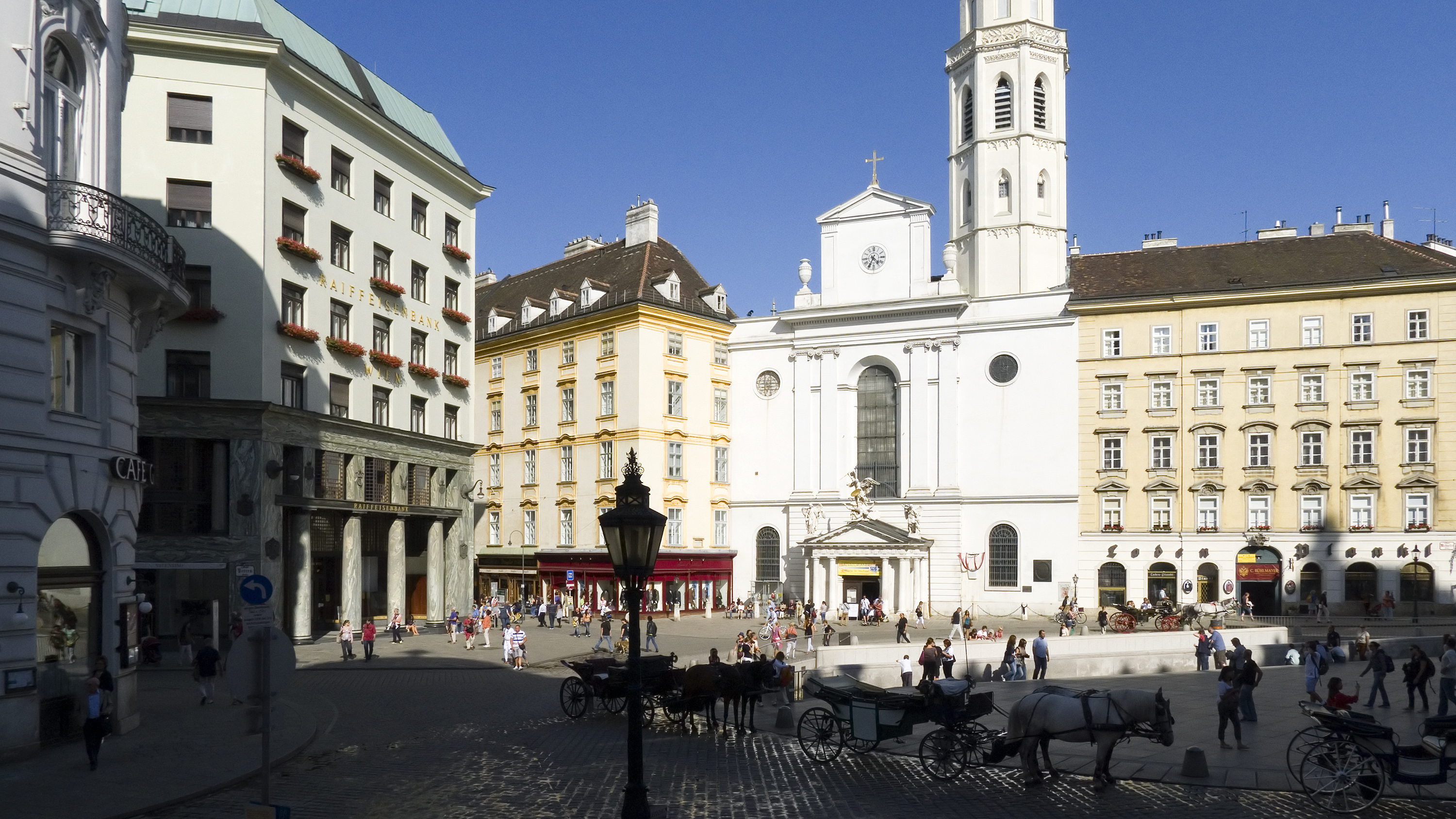 Michaelerplatz in Wien 1 bei der Schauflergasse Richtung Osten